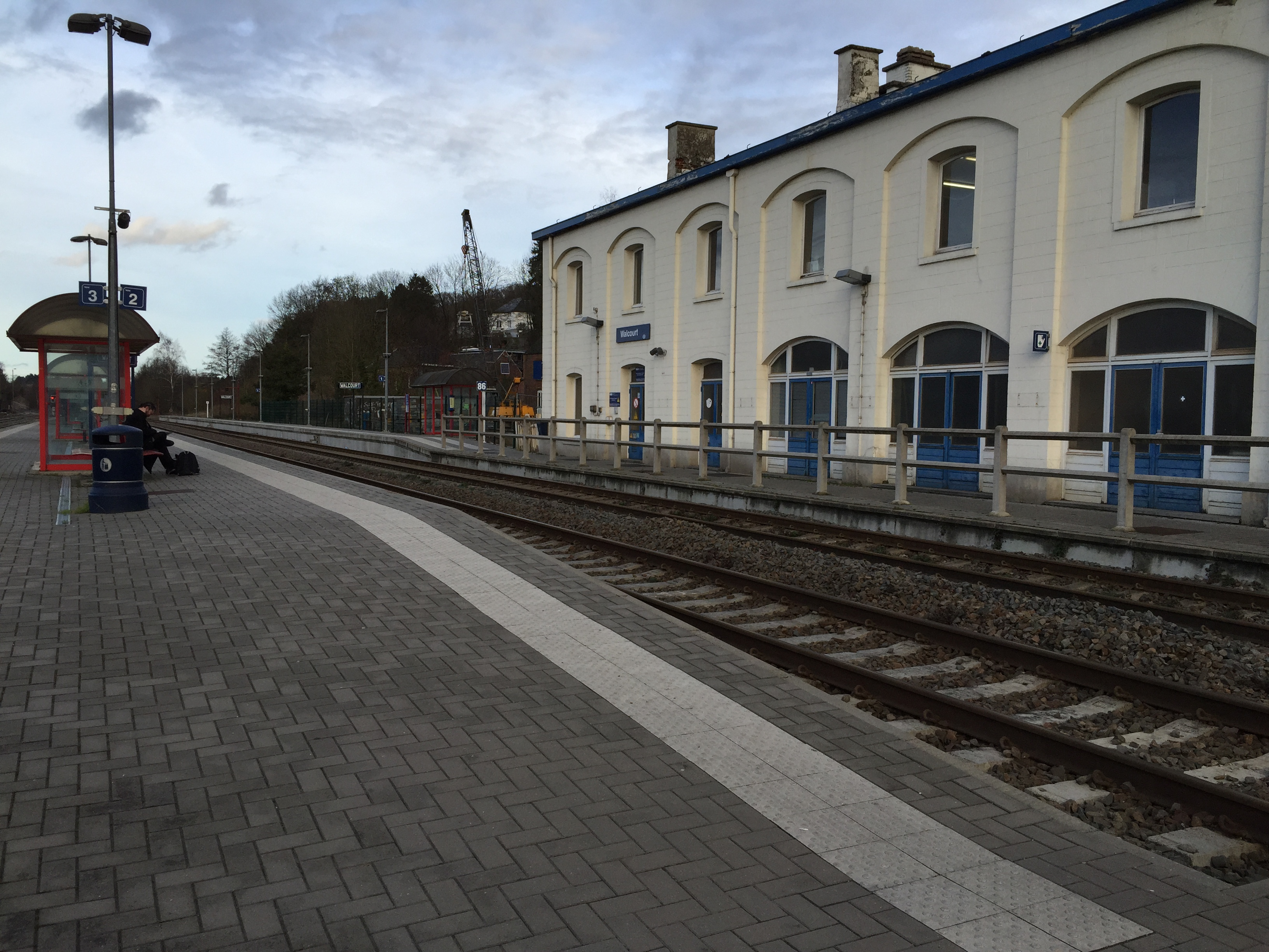 Gare de Walcourt 9